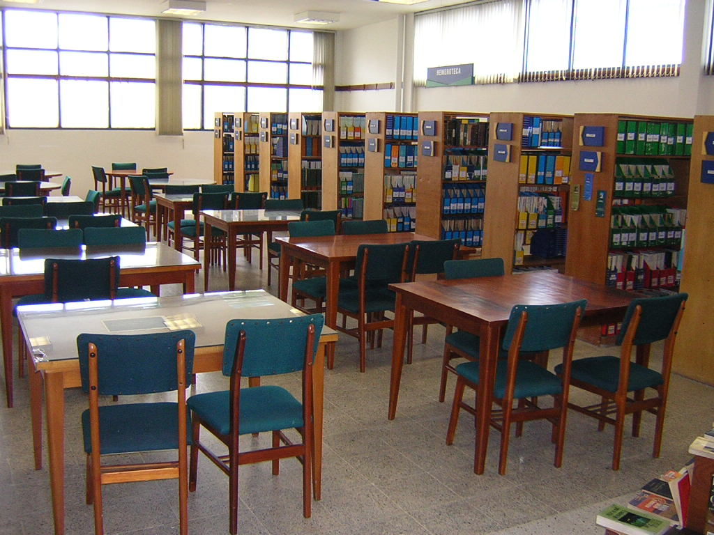 Biblioteca, Facultad de Odontología, Área de la Salud, Universidad de Antioquia, Medellín, Colombia (esta foto la tome yo, y la libero al dominio público)